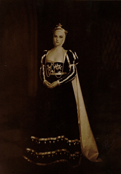 portrett, kvinne, skuespillerinne, stående helfigur, rollebilde, kostyme.